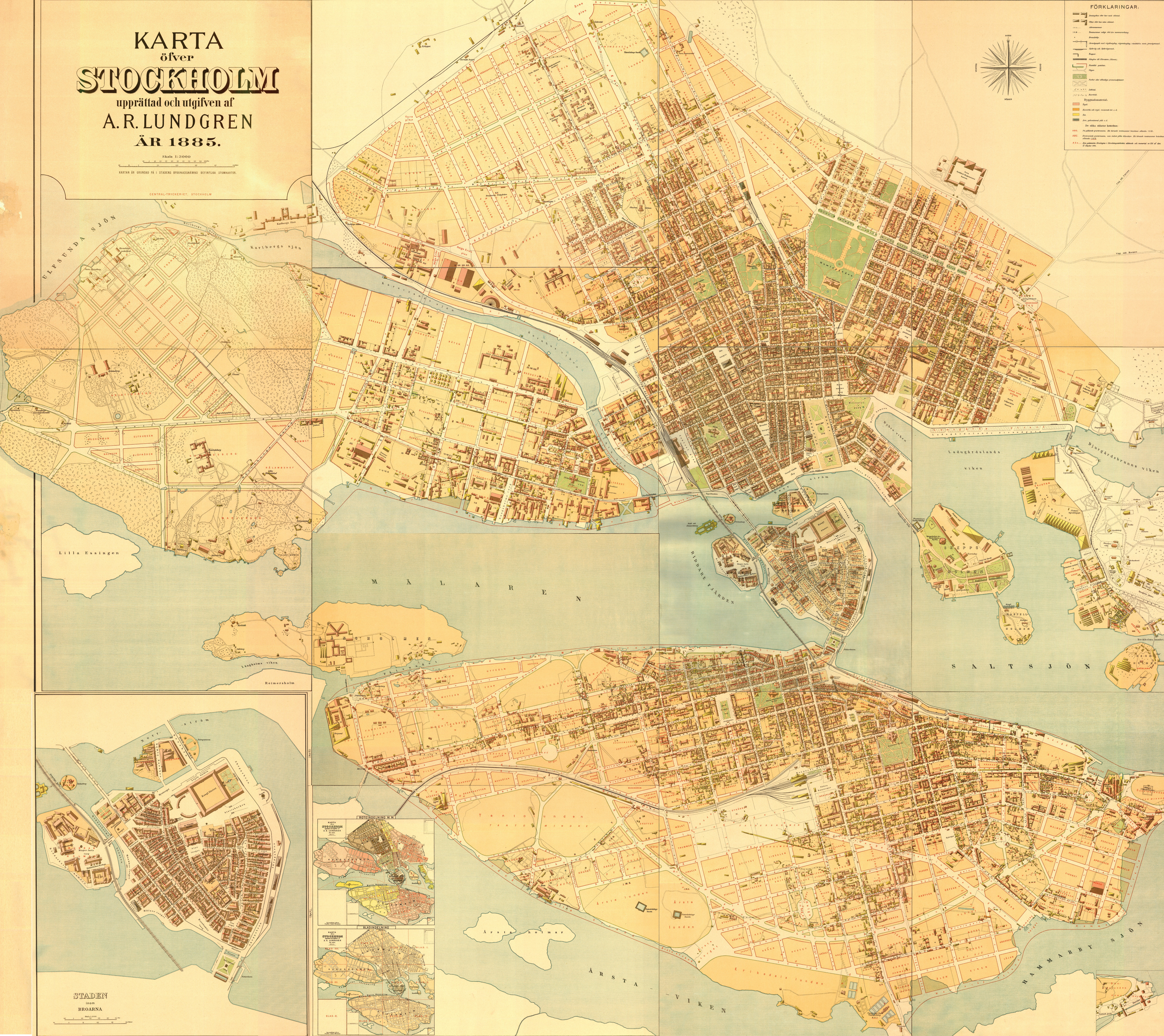 Karta över Stockholm sammanställning av alla kartblad